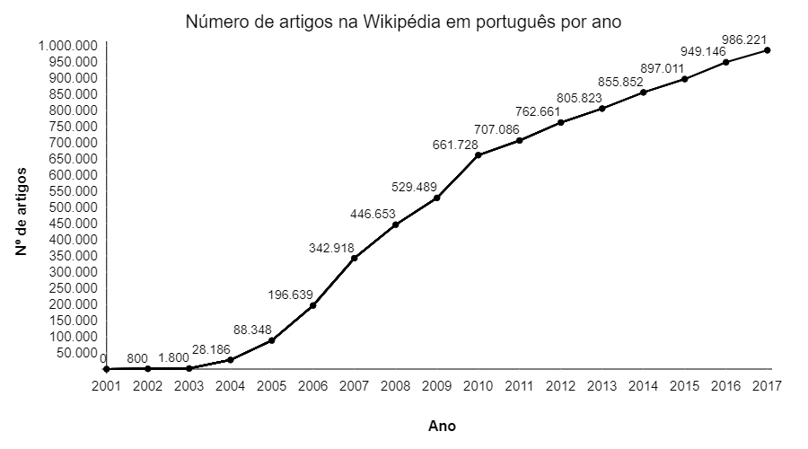 Quantidade de artigos na Wikipédia em português entre 01/2011 e 12/2016.